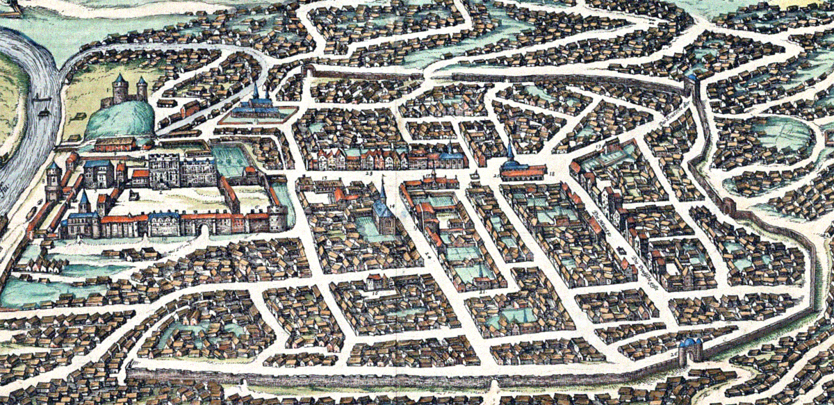 Vilniaus miesto ginybinė siena, 1581 Lietuva Vilnius city wall in 1581, Lithuania